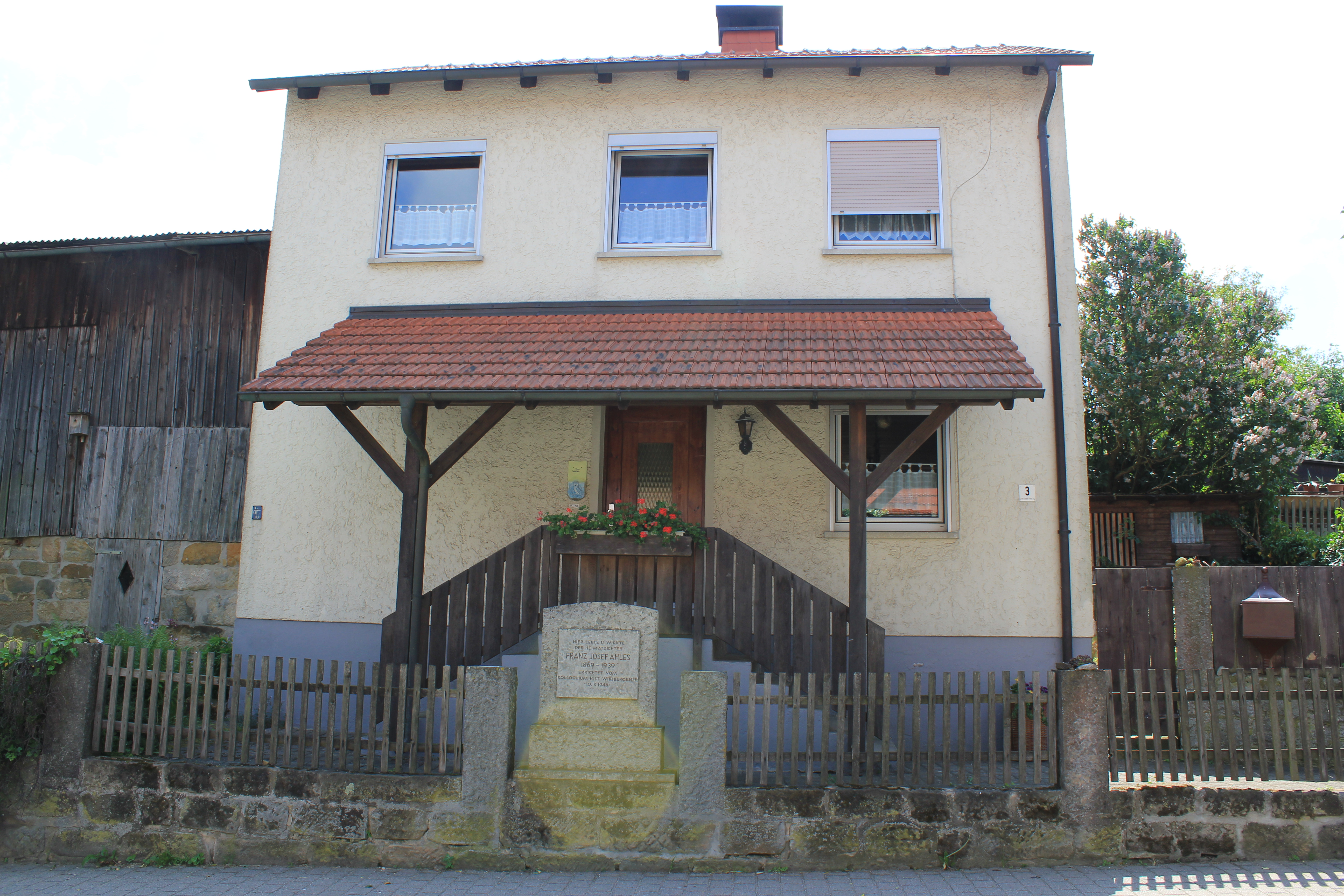 Wohnhaus des Burkheimer Heimatdichters Franz Josef Ahles (Franz-Joseph-Ahles-Straße 3)